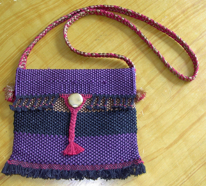 Rundväv i väska.